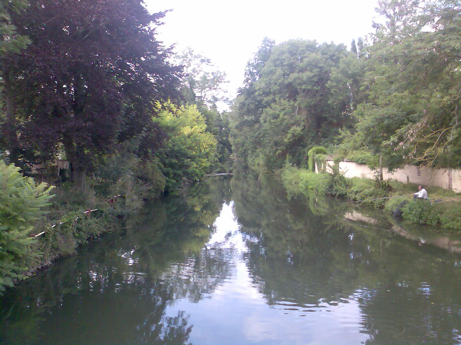 La rivière l'Eure, Ecluzelles, Eure-et-Loir (France).